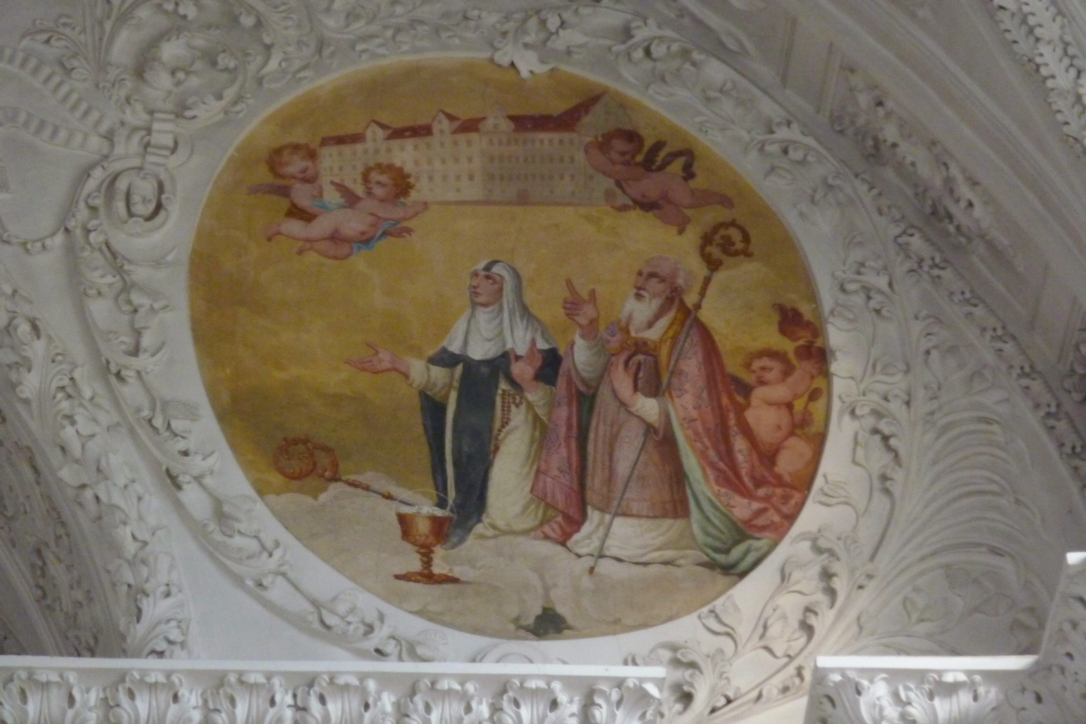 Ehemalige Damenstiftskirche, katholische Pfarrkirche St. Johannes Baptist und Johannes Evangelist in Edelstetten in der Gemeinde Neuburg an der Kammel im Landkreis Günzburg (Bayern), Stuck von Simpert Kraemer von 1710/1711, Freskenzyklus von Arbogast Thalheimer von 1710/11, Darstellung: Mechthild von Dießen, von 1153 bis 1160 Äbtissin von Edelstetten, hl. Augustinus